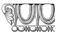 Eierstab